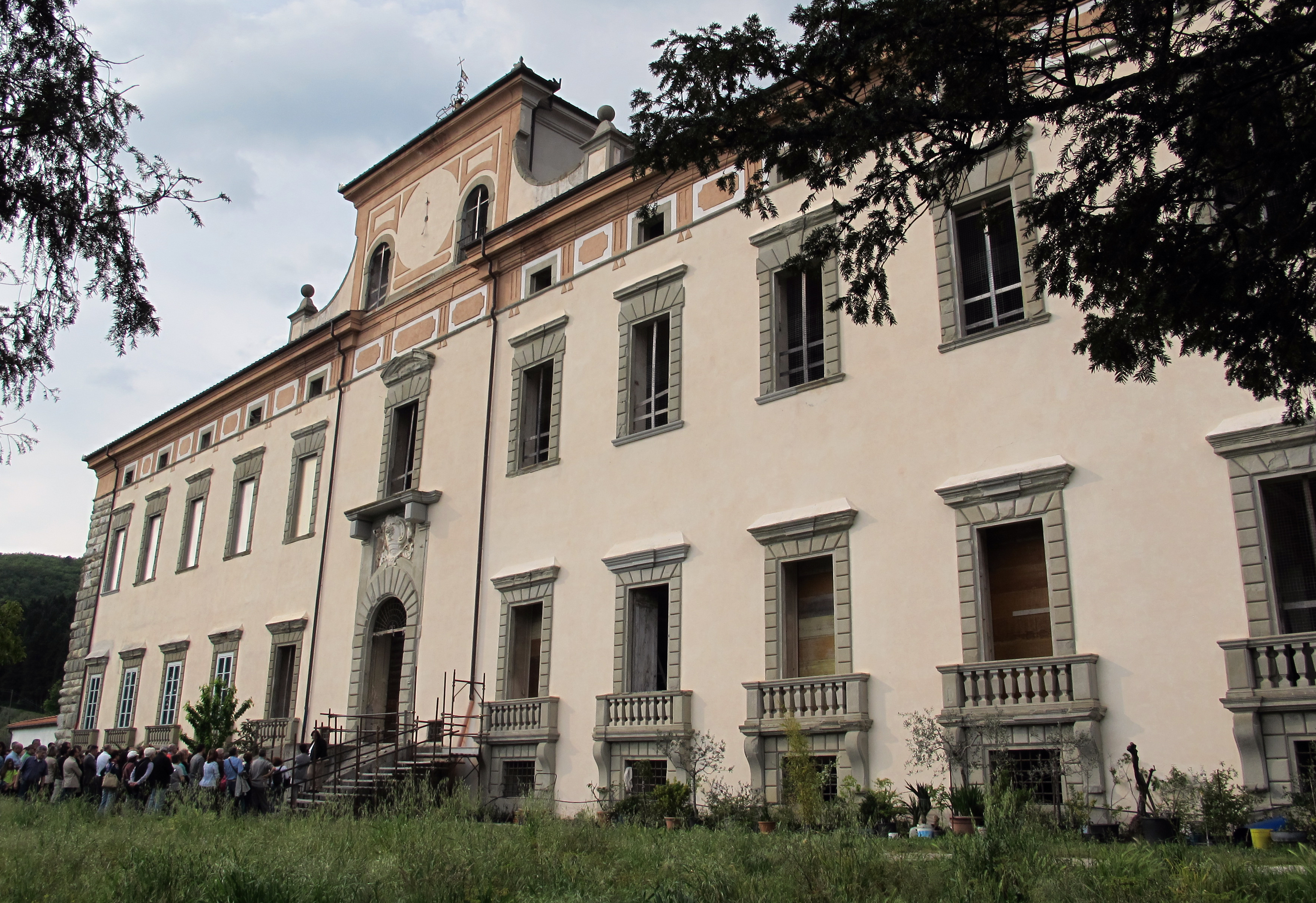 Villa del Barone, Montemurlo